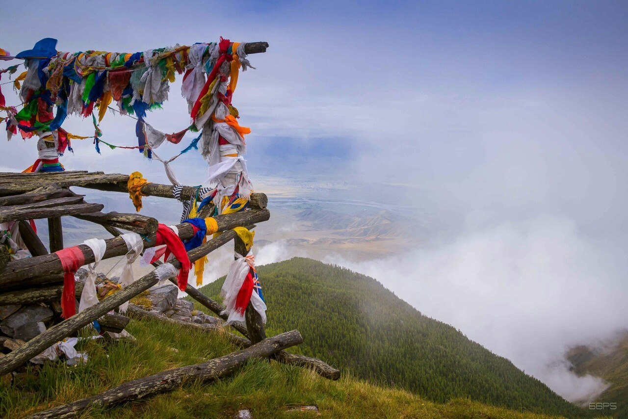 Гора Буура, Улуг-Хемский район